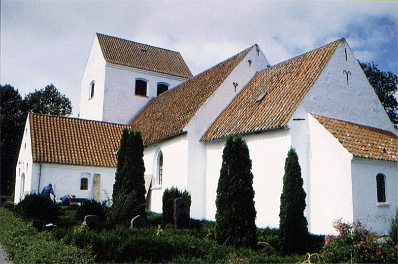 Nølev Kirke ligger mellem Malling og Odder, i Nølev Sogn i det tidligere Hads Herred Århus Amt, nu Odder Kommune, Region Midtjylland. Kor og skib er opført i romansk tid af rå og kløvet grani